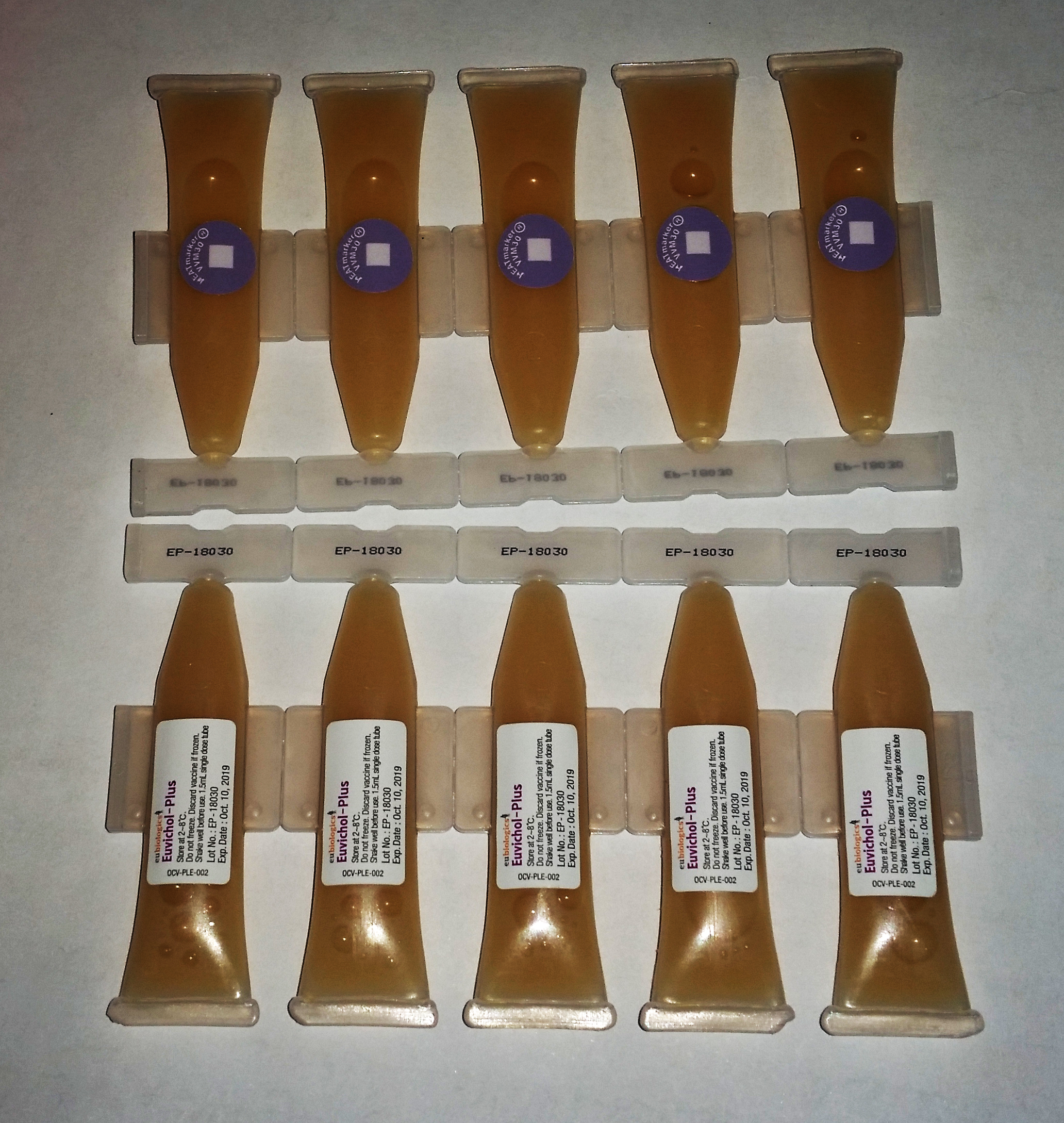 لقاح Euvichol-plus لمرض الكوليرا